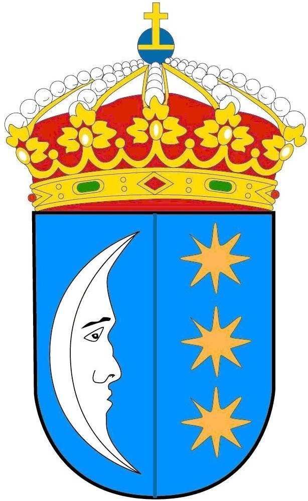 Escudo de Tui (Pontevedra)